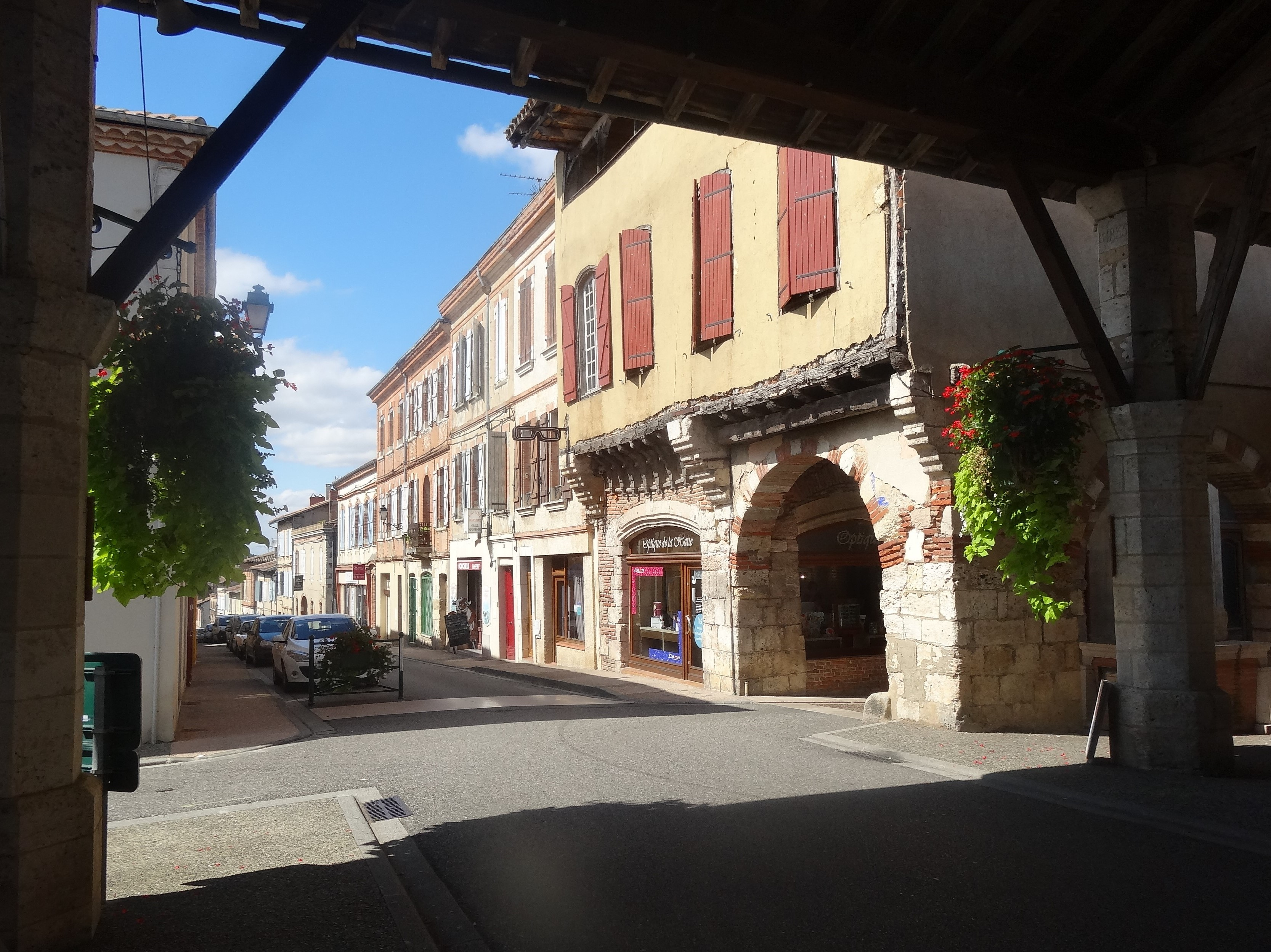 Maison 14e siècle à Gimont, vue depuis la halle. .